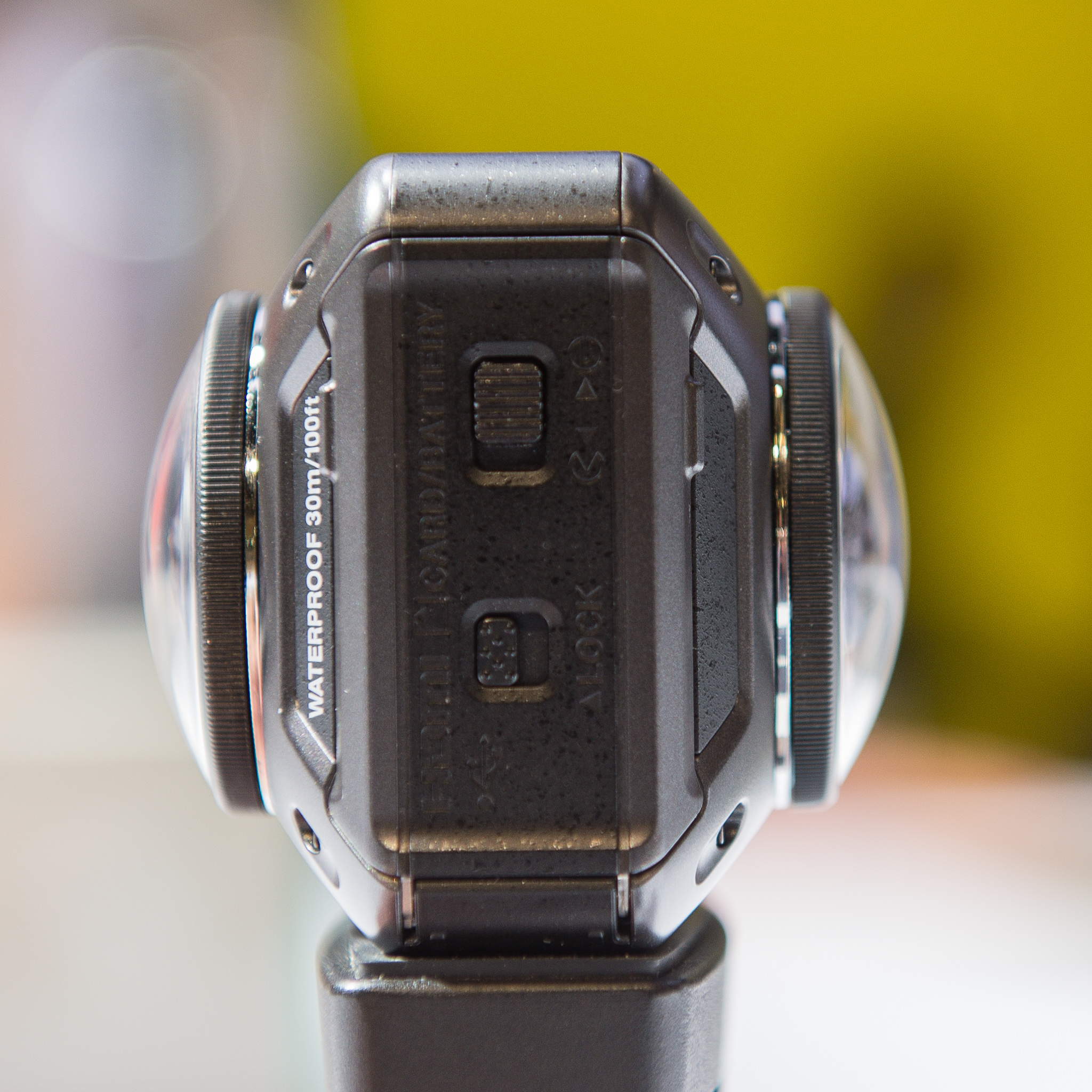 KeyMission 360,Kölnmesse,Nikon,Photokina 2016